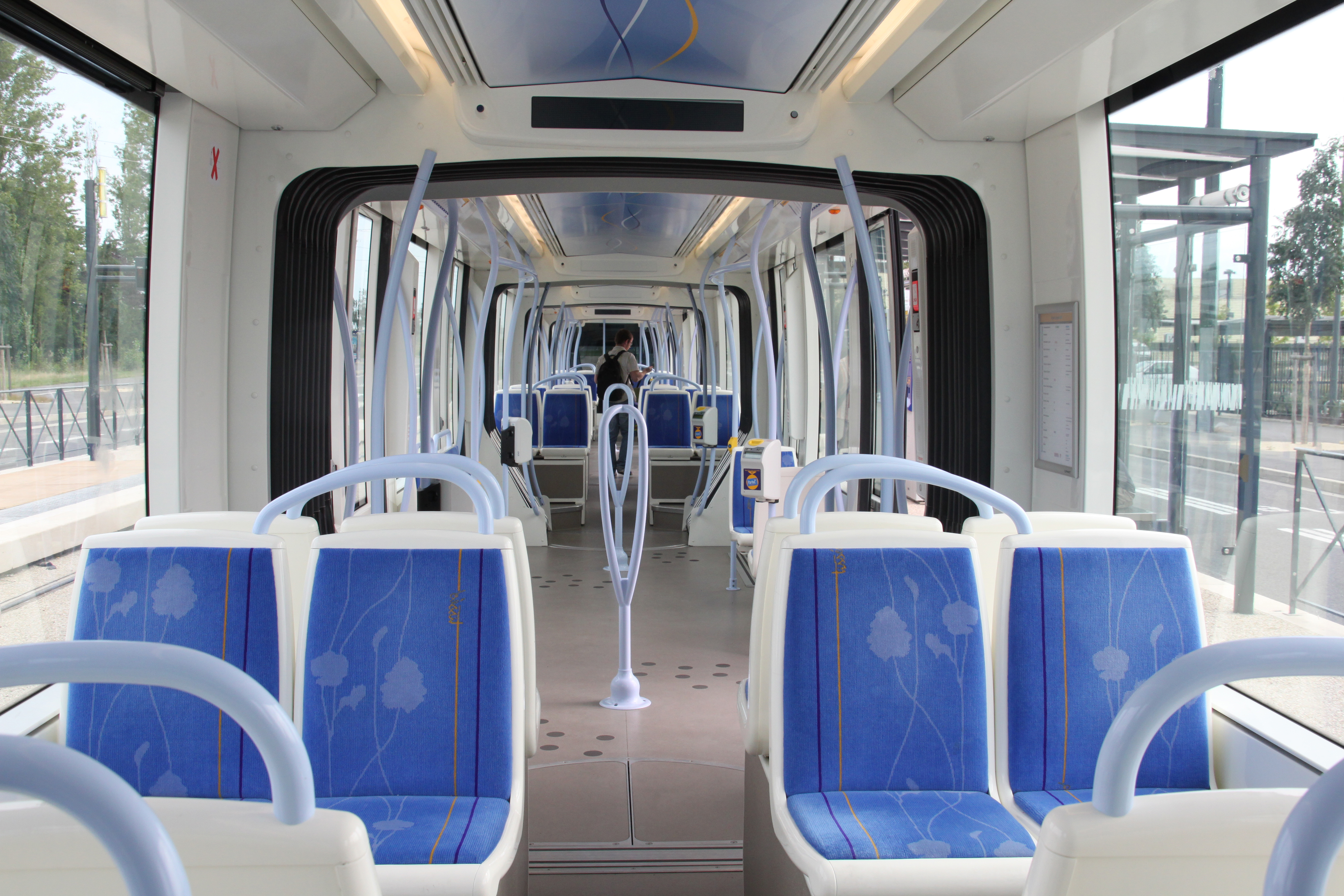 Interieur van een Citadis van Toulouse.